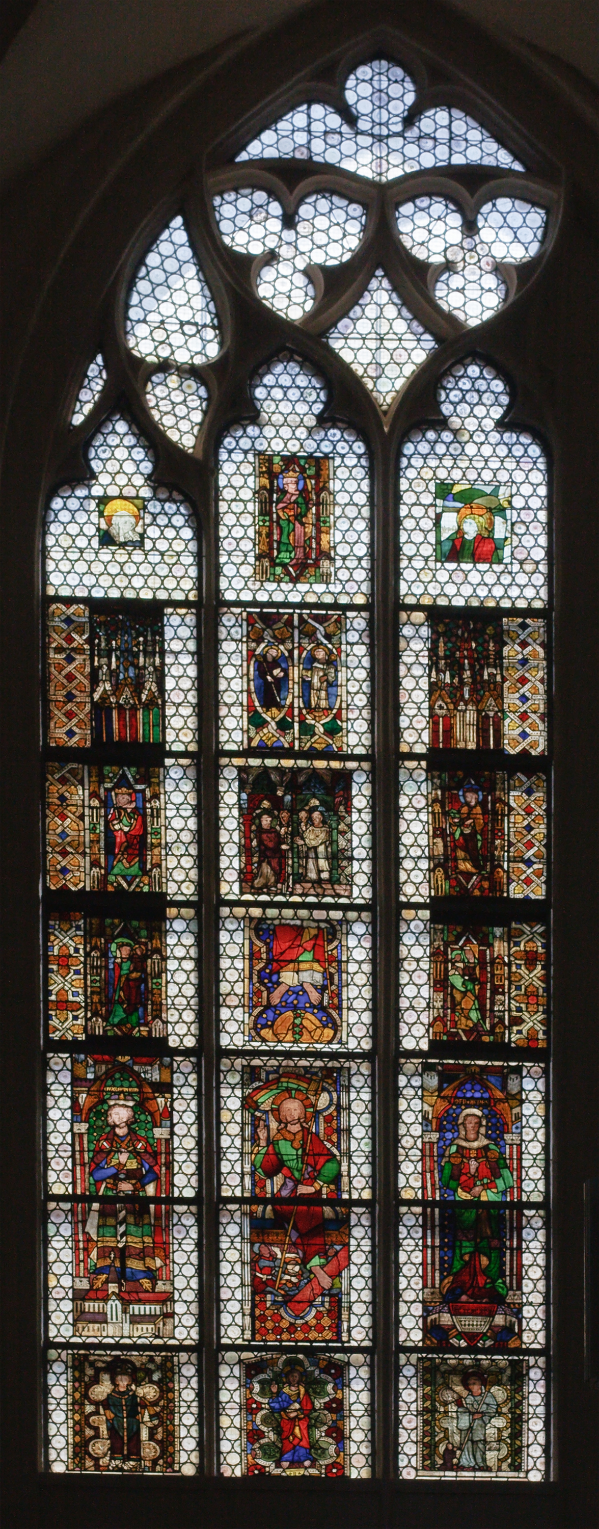 Das Laxenburger Fenster in der Steyrer Stadtpfarrkirche mit Glasmalereien von Beginn der Gotik bis zum Ende des 15. Jahrhunderts